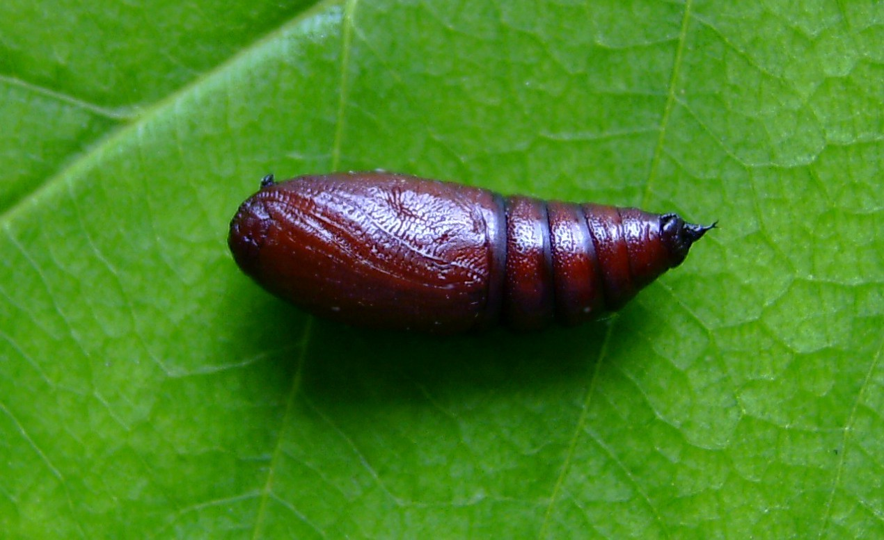 Großer Frostspanner, Puppe, 26.05.2016, Frankfurt am Main